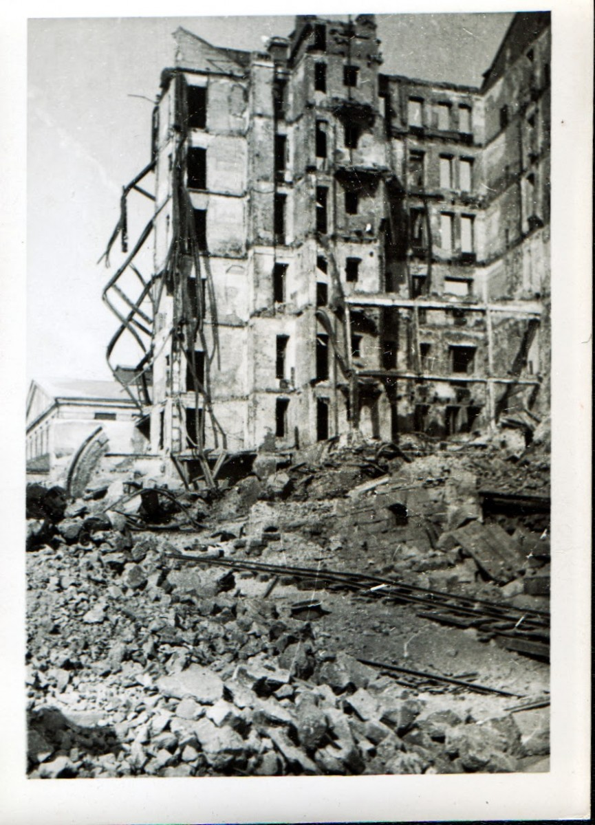 Ростов-на-Дону. Доходный дом Рецкер и Хосудовского, разрушение дома 1942г. .